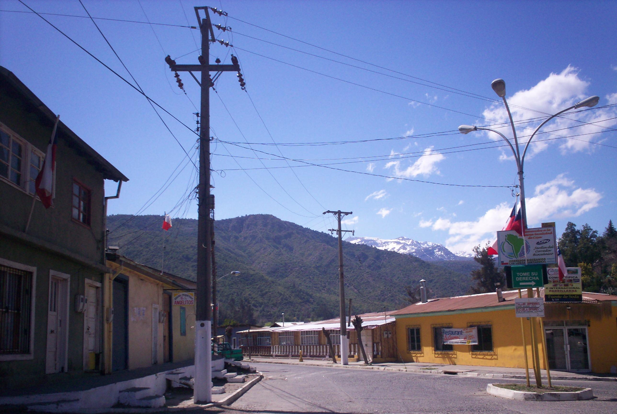 Coya, Machalí, Región del Libertador General Bernardo O'Higgins, Chile